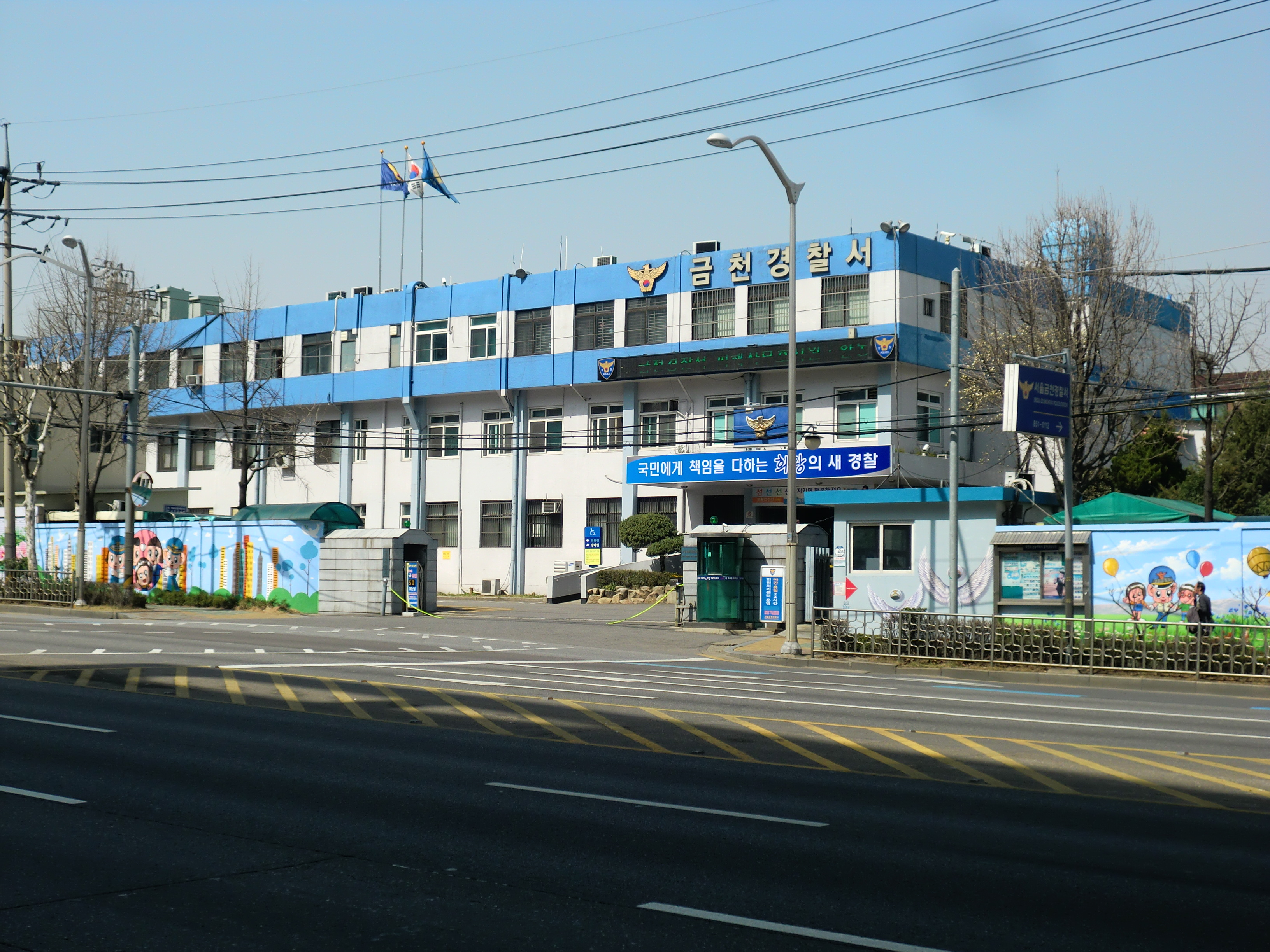 서울특별시 관악구에 있는 서울금천경찰서